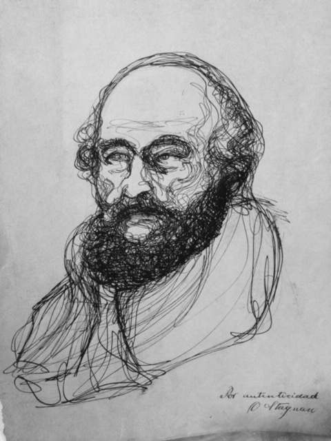 Mijail Bakunin, c.1917, tinta